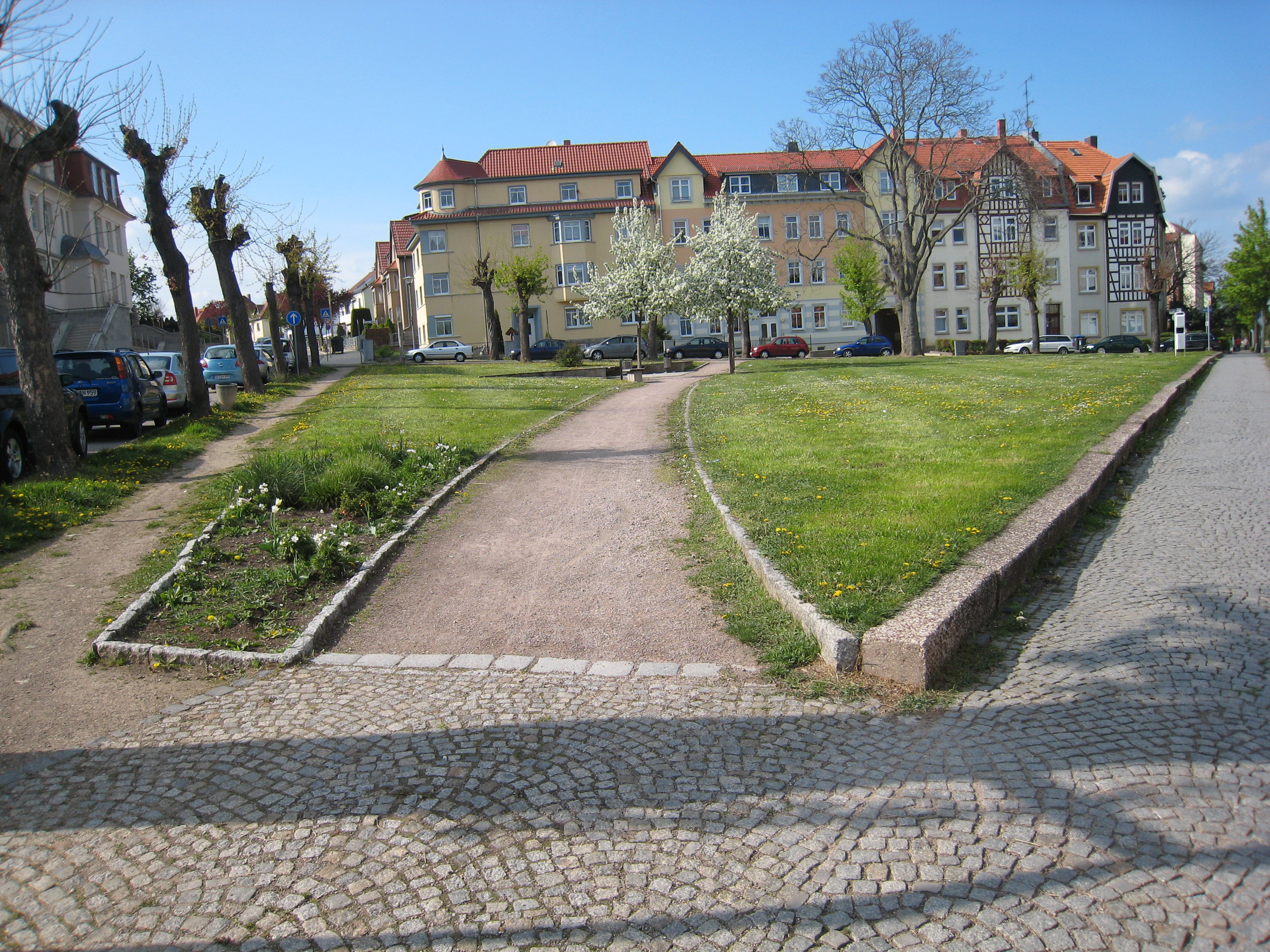 Platz der Versöhnung in Arnstadt, zwischen Kasseler Straße und Richard-Wagner-Straße.